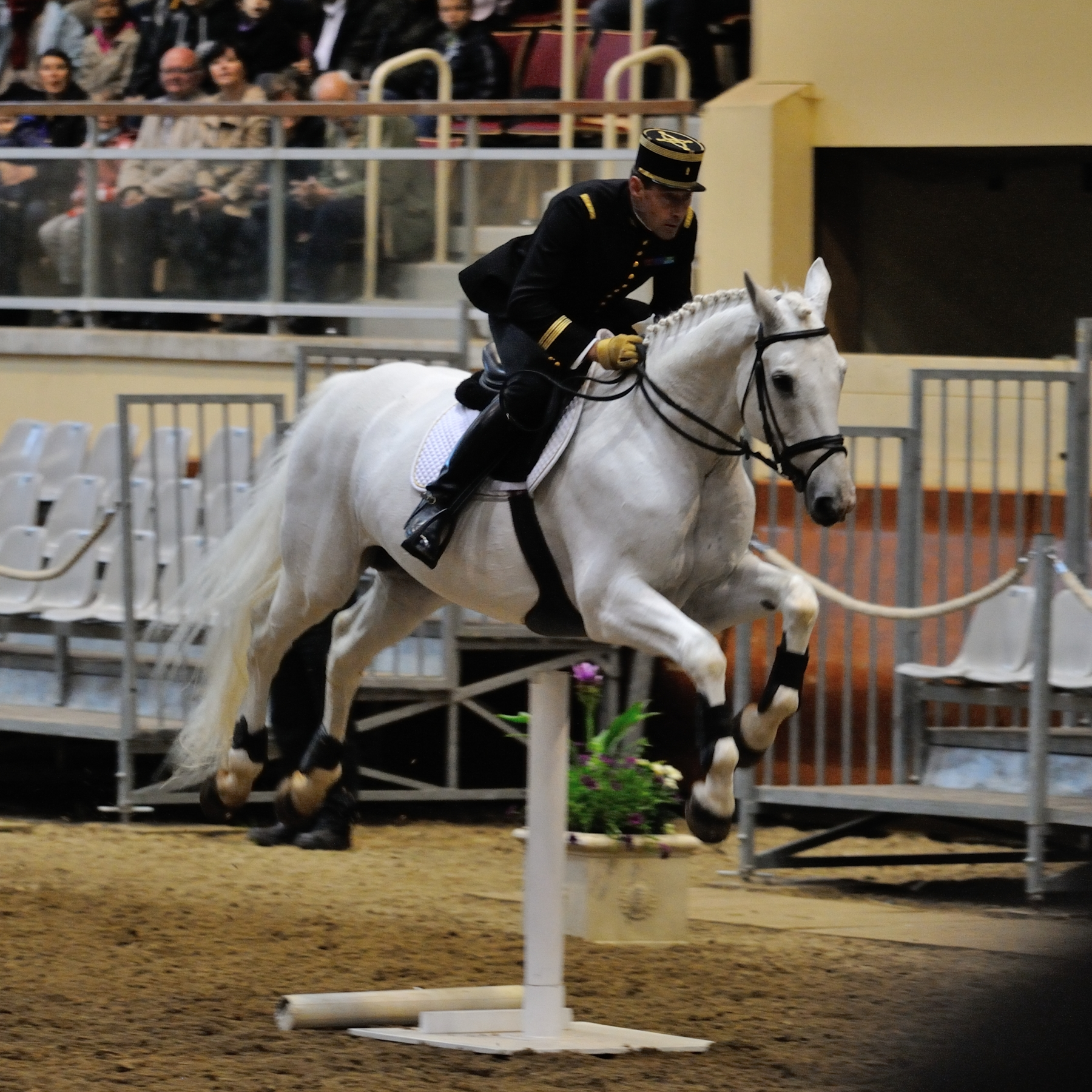 Présentation publique du Cadre noir, École nationale d'équitation, Saumur - Saut du piquet.